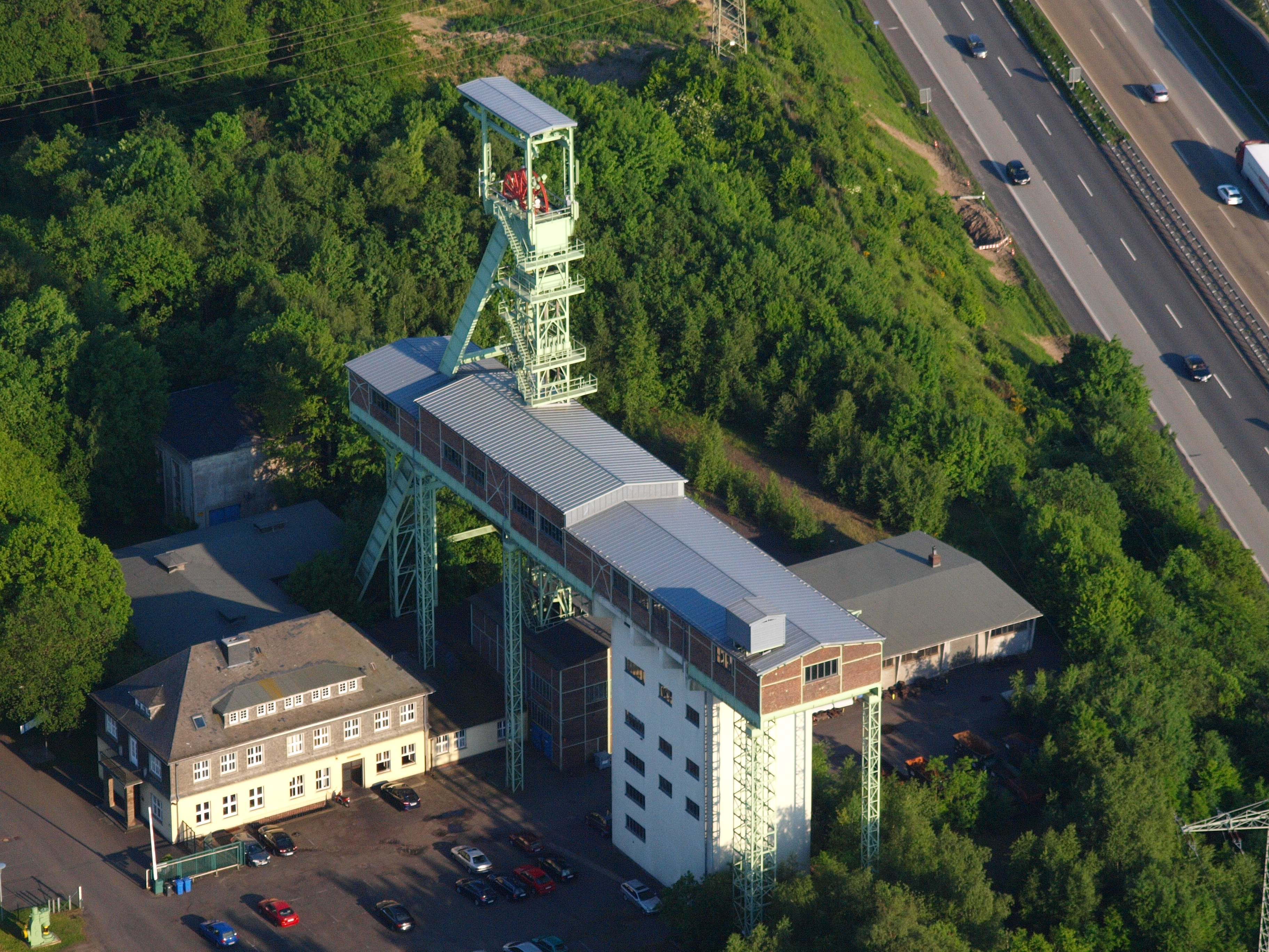 Grube Georg: Luftaufnahme